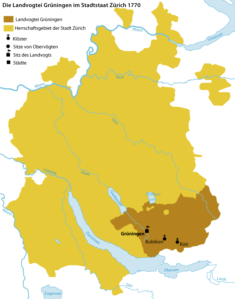 Die Landvogtei Grüningen im Stadtstaat Zürich im 18. Jahrhundert vor ihrer Auflösung 1798